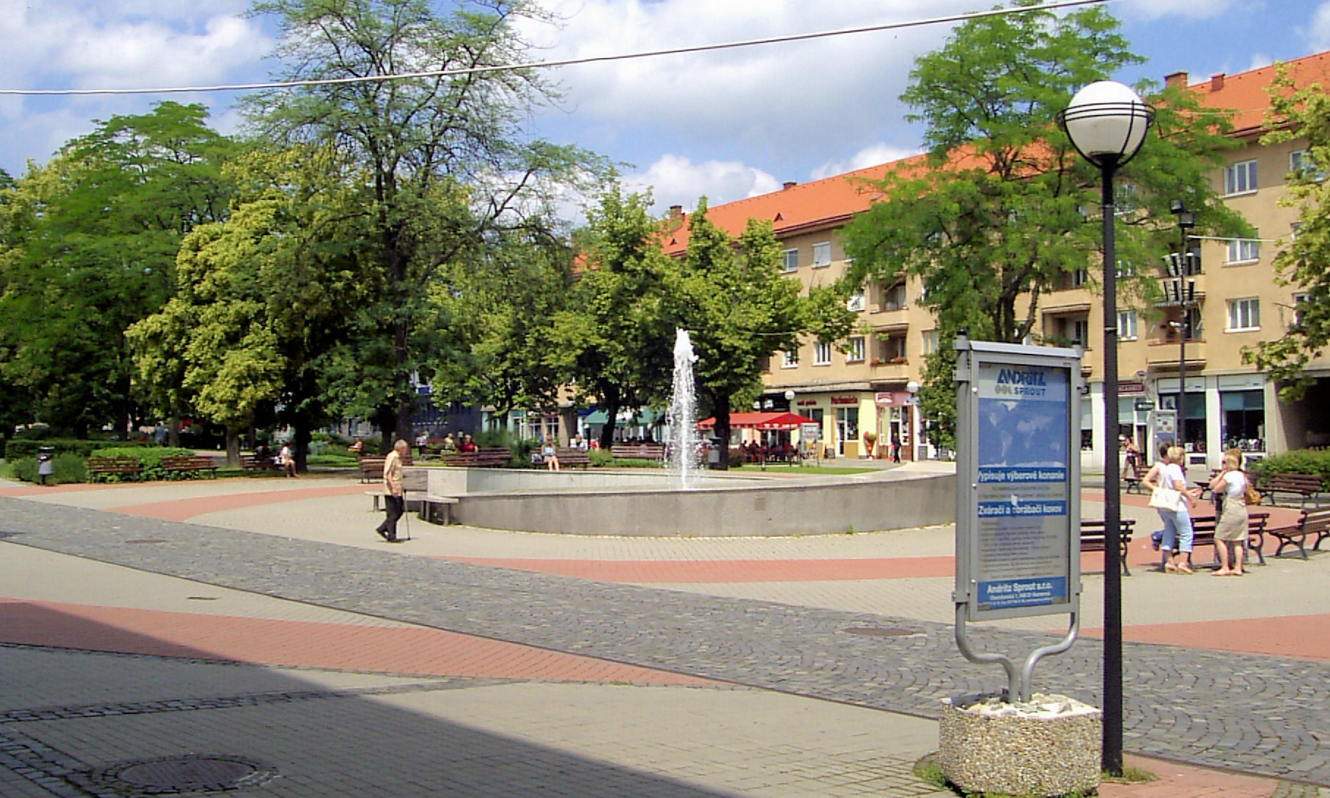 Námestie slobody Humenné